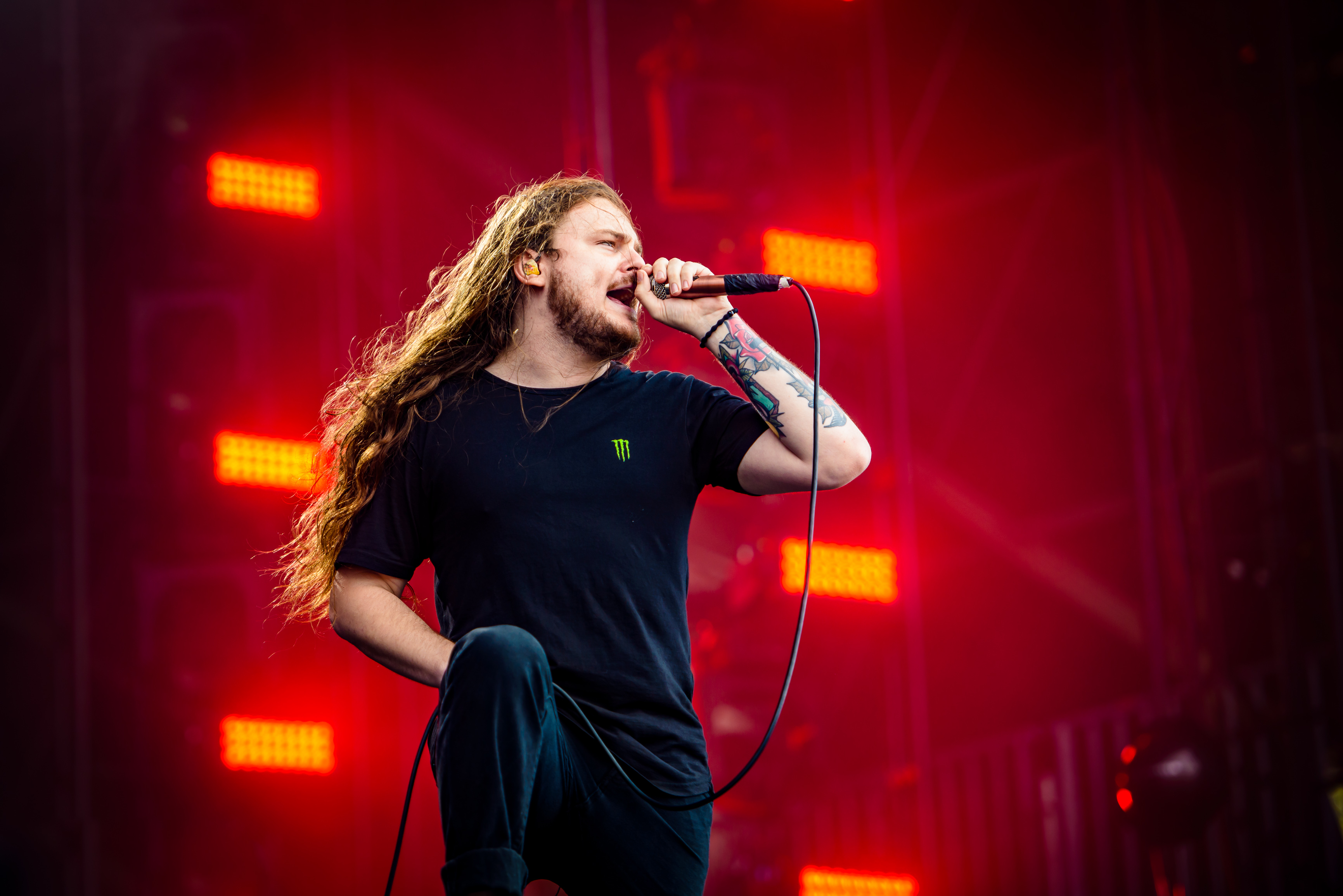 'Wacken Open Air 2019; Wacken': 'Of Mice & Men'